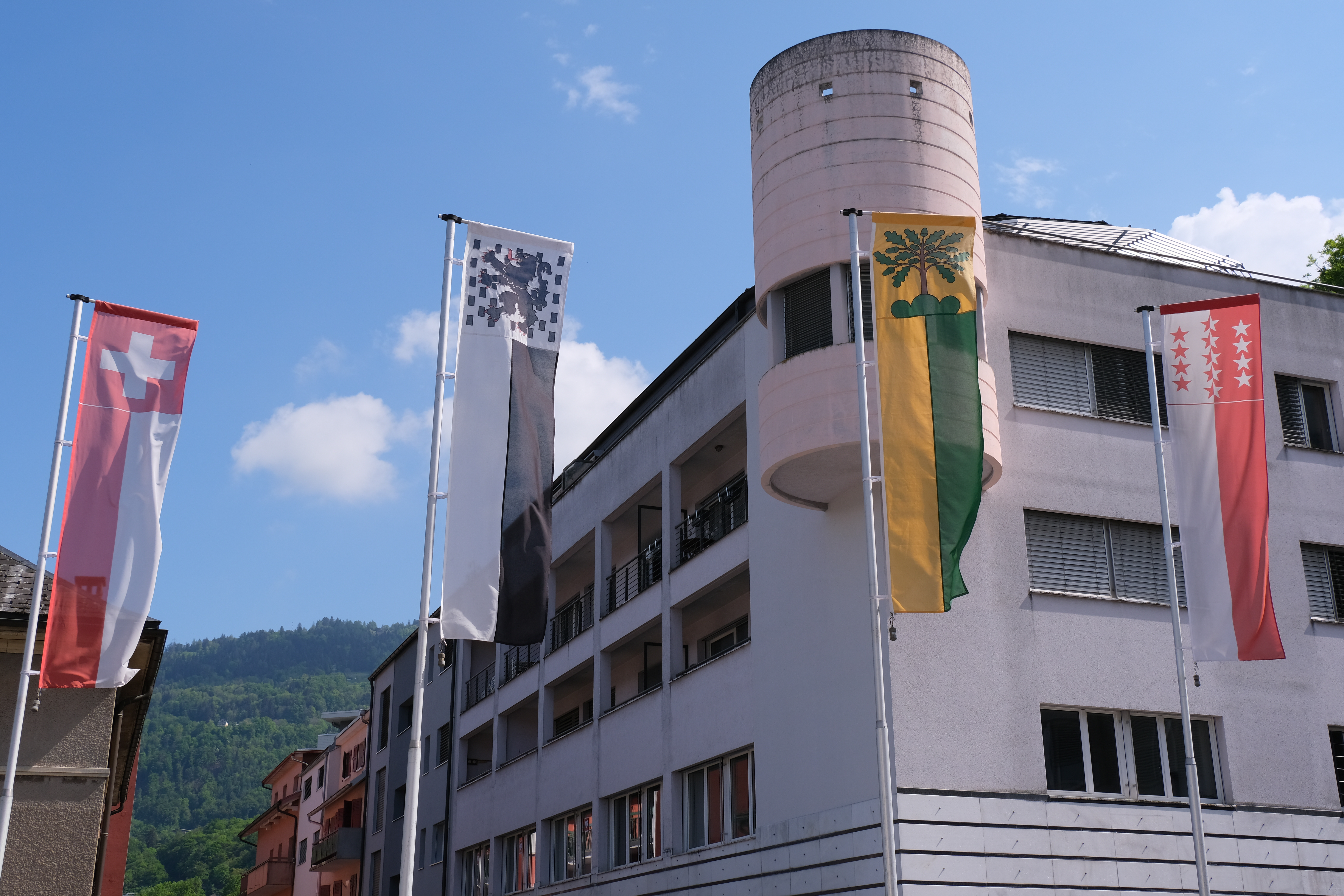 Les drapeaux, de gauche à droite, de la Suisse, du Chablais, de Monthey et du Valais à Monthey en 2020.